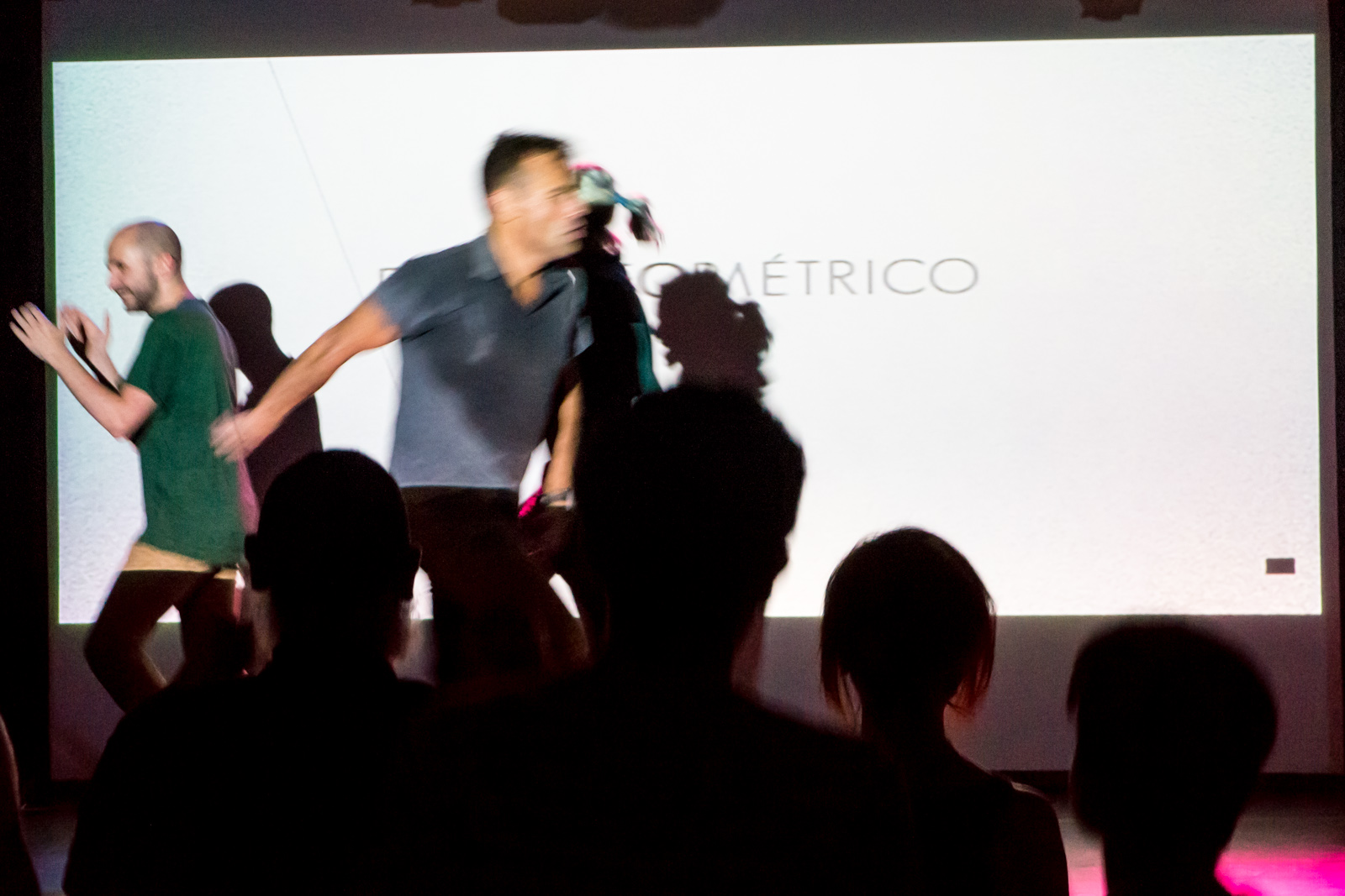 Concierto de Esplendor Geométrico Casa Encendida